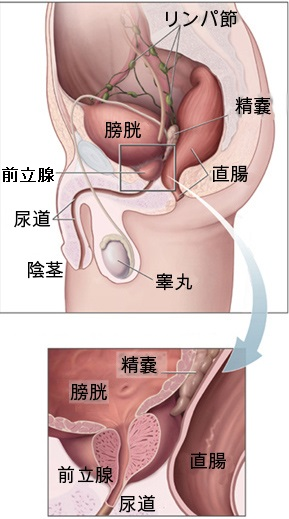 Prostatelead-Japanese.jpg画像の前立腺説明部が「膀胱」となっていたので修正